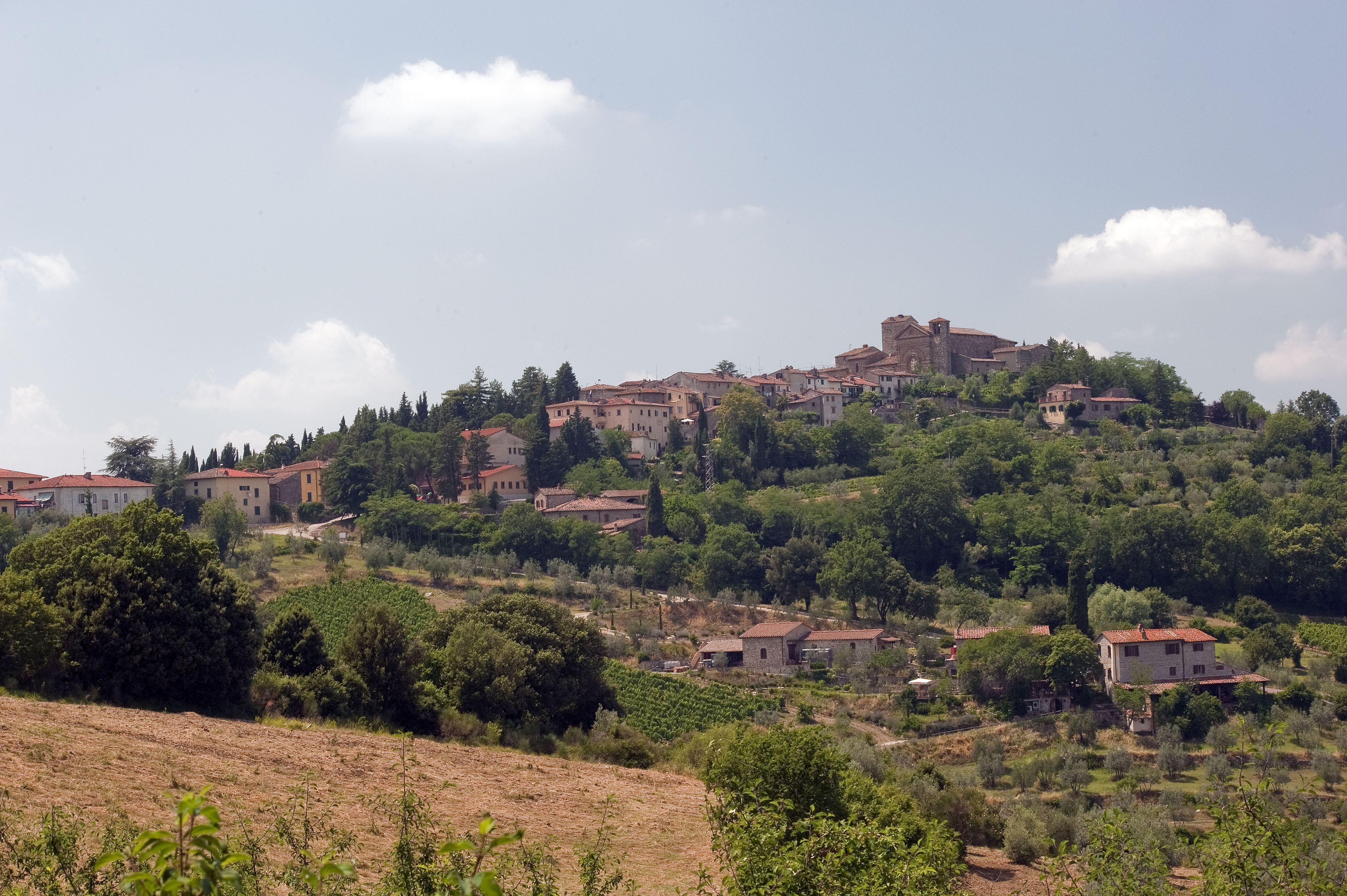 Panorama di Panzano in Chianti